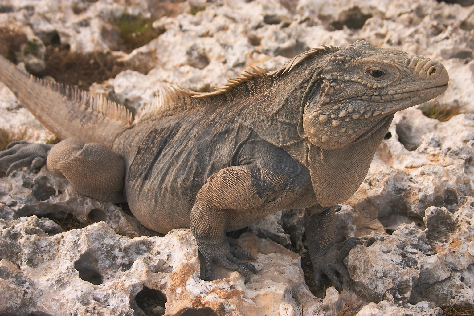 Cayo Largo, Cuba